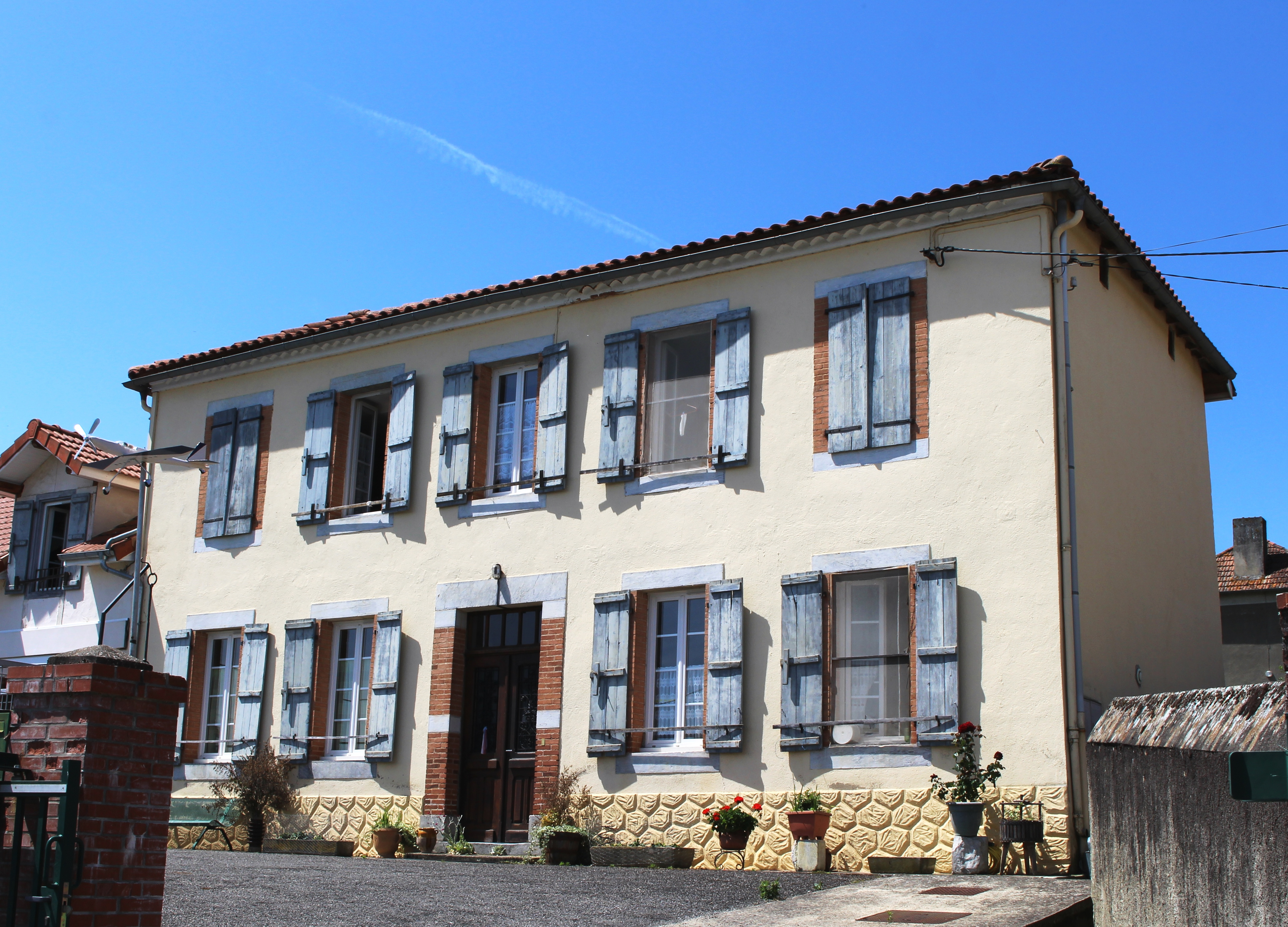 Mairie de Mansan (Hautes-Pyrénées)